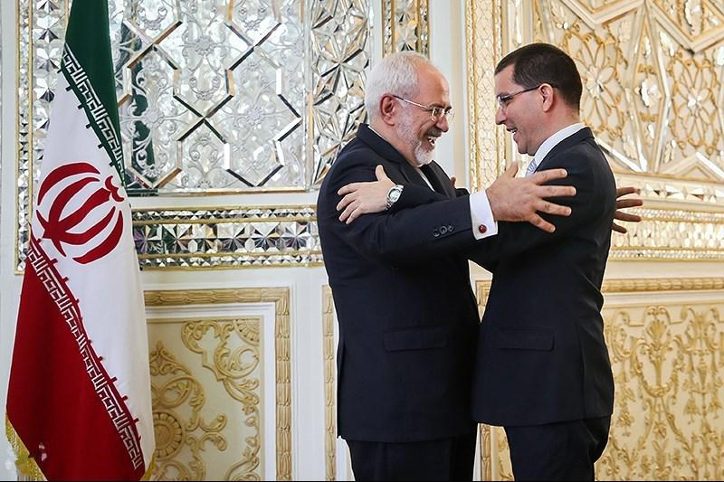 Venezuela’s Top Diplomat Visits Iran - TEHRAN (Tasnim) – Heading a diplomatic delegation, Foreign Minister of Venezuela Jorge Arreaza held a meeting with his Iranian counterpart Mohammad Javad Zarif in Tehran on Saturday.